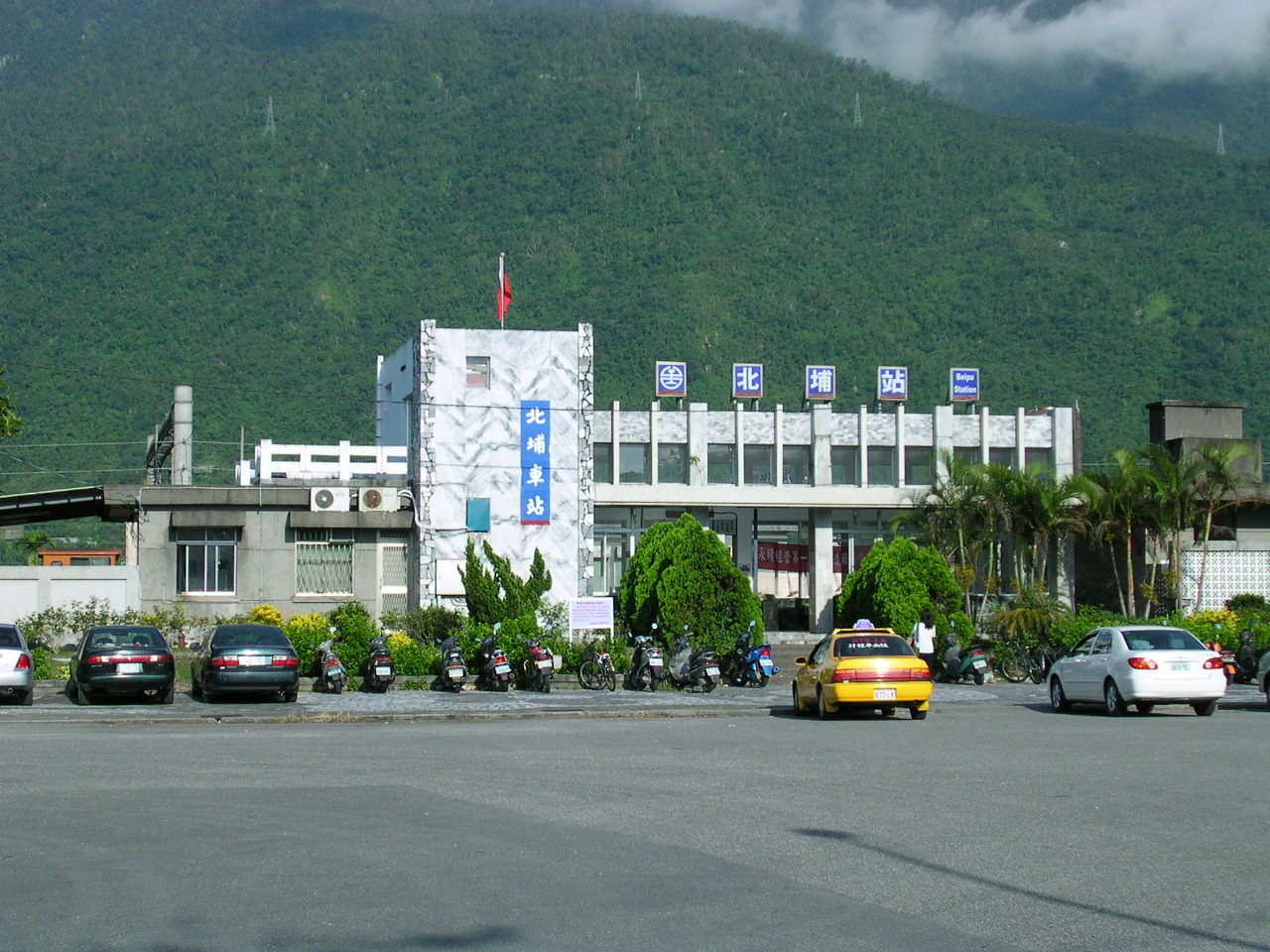 臺鐵北迴線北埔車站站前。